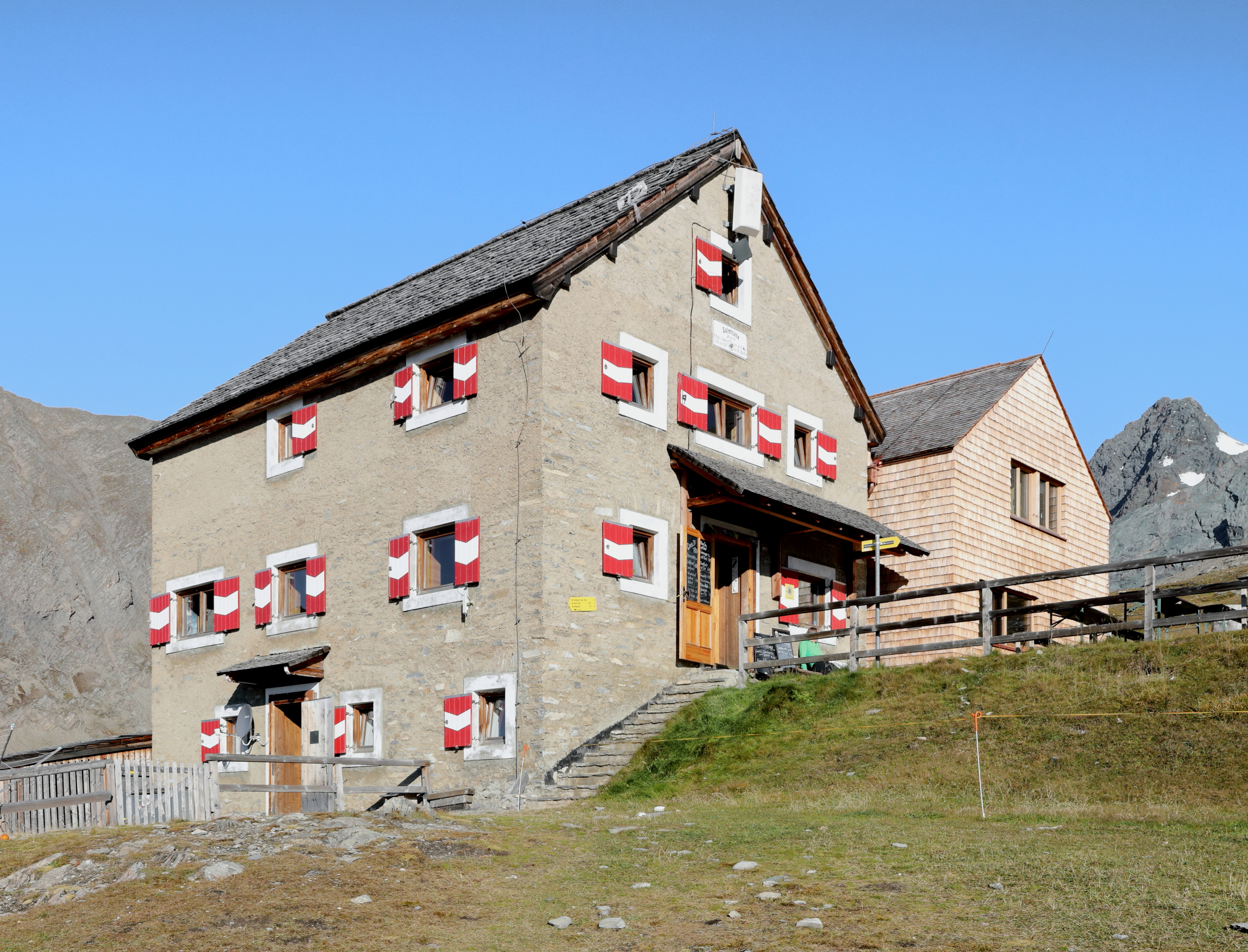 Ostsüdostansicht der Salmhütte in der österreichischen Gemeinde Heiligenblut am Großglockner in Kärnten mit dem Großglockner rechts im Hintergrund.Die Salmhütte befindet sich auf 2644 m Seehöhe und wurde in der heutigen Form 1926/27 errichtet. Sie ist nach dem Finanzier der ersten Salmhütte, Fürstbischof Franz II. Xaver von Salm-Reifferscheidt, benannt. 2017 erfolgte nordseitig ein hölzerner Zubau (Eröffnung am 30. Juni 2018), der in erster Linie die neue Küche und im Obergeschoß eine „Dienstwohnung“ beherbergt.